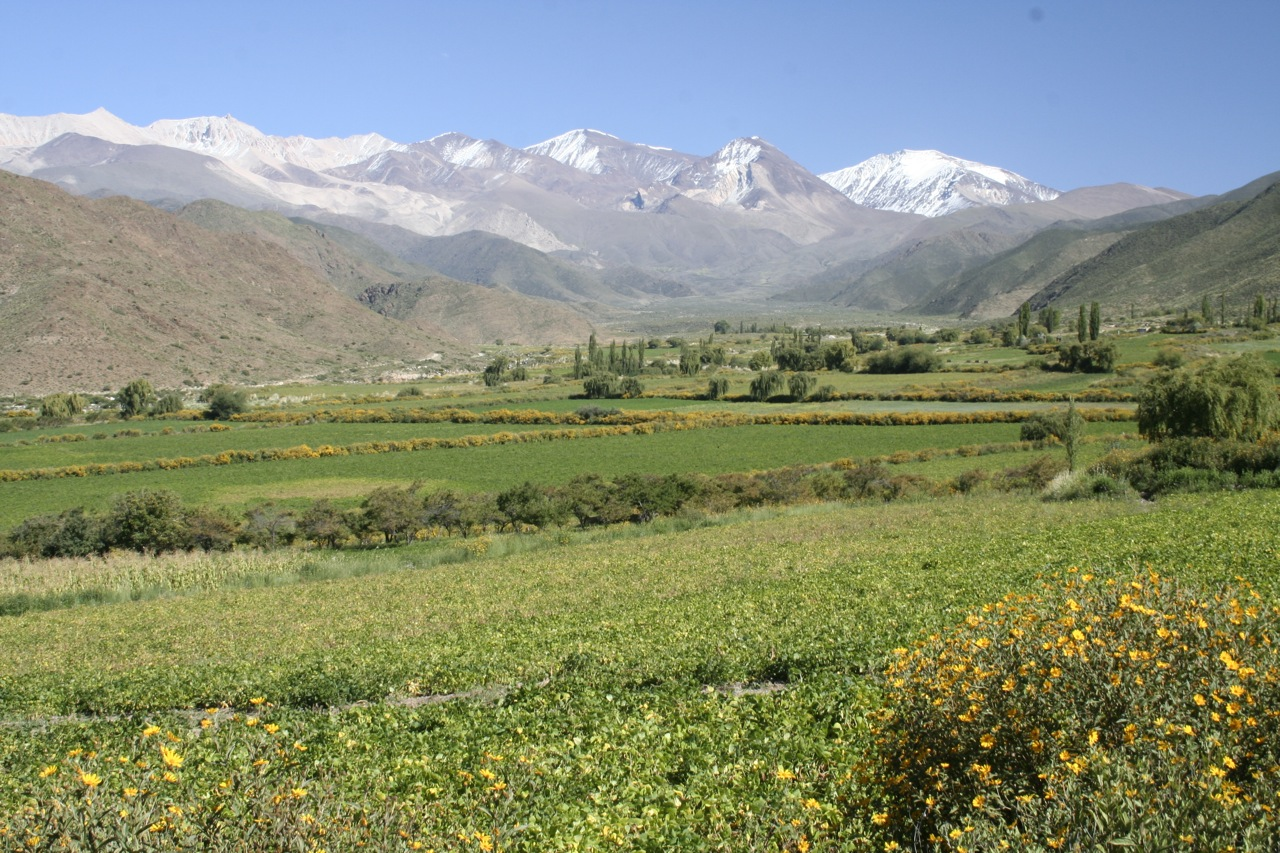 Cachi, Provincia de Salta, Argentina